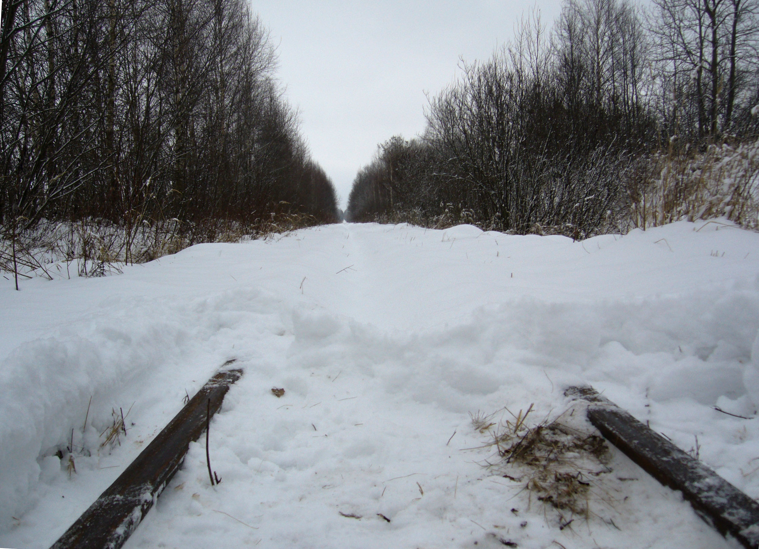 Рязанско-Владимирская УЖД. Путь в направлении на Гуреевский.